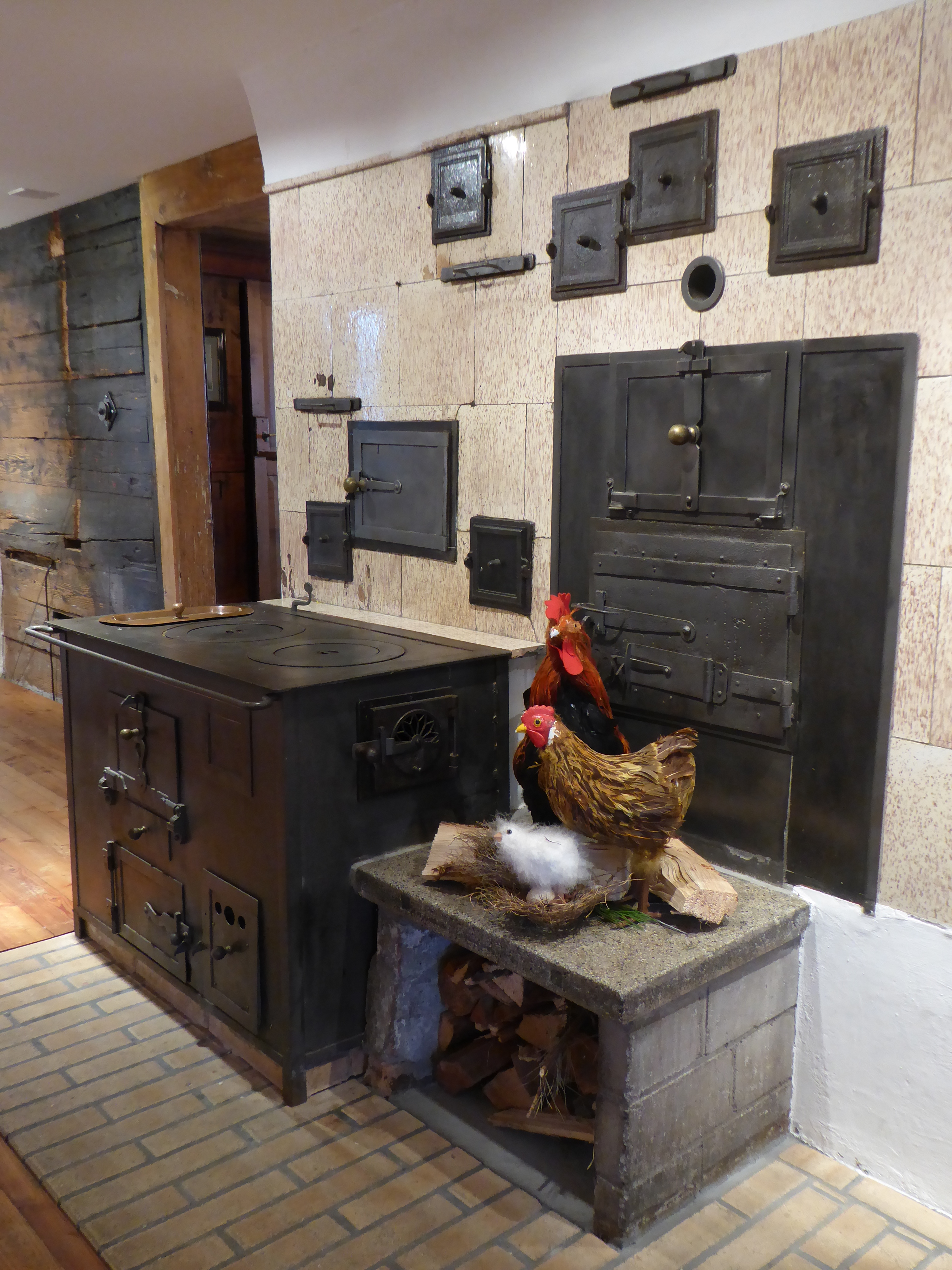 Kochher und Ofen im Küfer-Martis-Hus, Ruggell FL